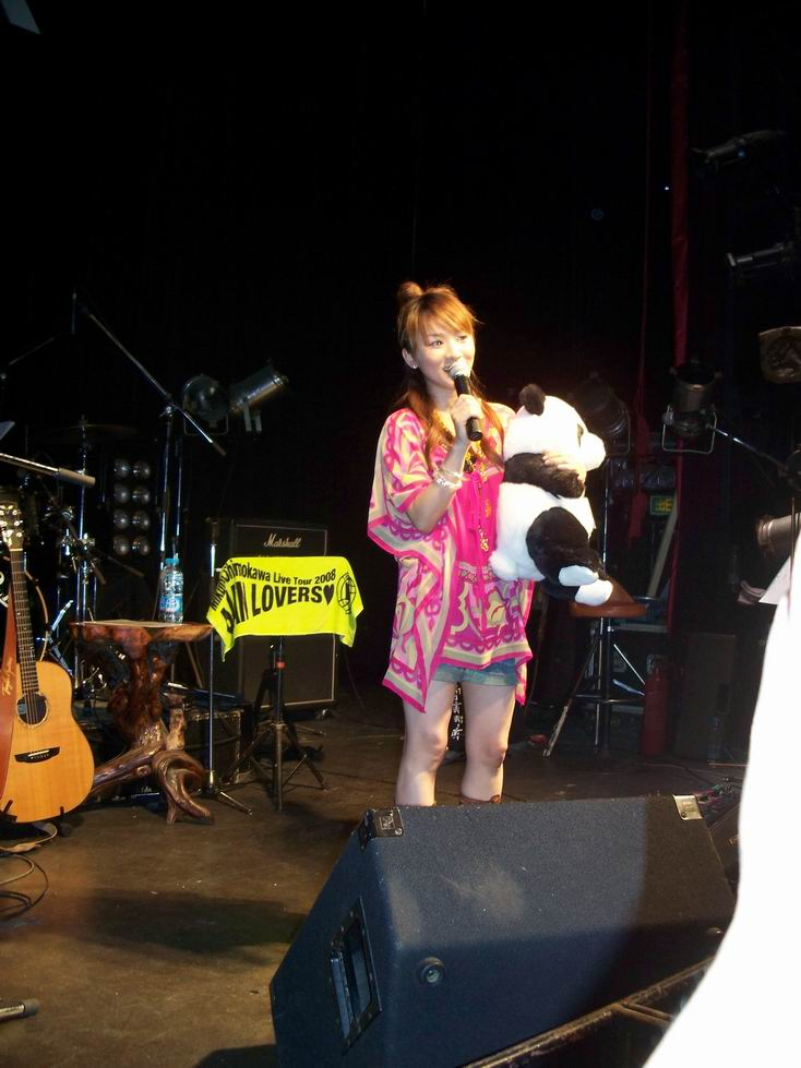 Information |A= 下川美娜2008亚洲巡回演唱会上海新天地ARK站现场照片 |B= 个人作品 |C= 2008-06-21 |D= Fans cslmx拍摄 |E= |F= 取得作者本人授权 将照片用于wiki 并以GFDL发布(稍后作者本人上wiki进行验证查阅)